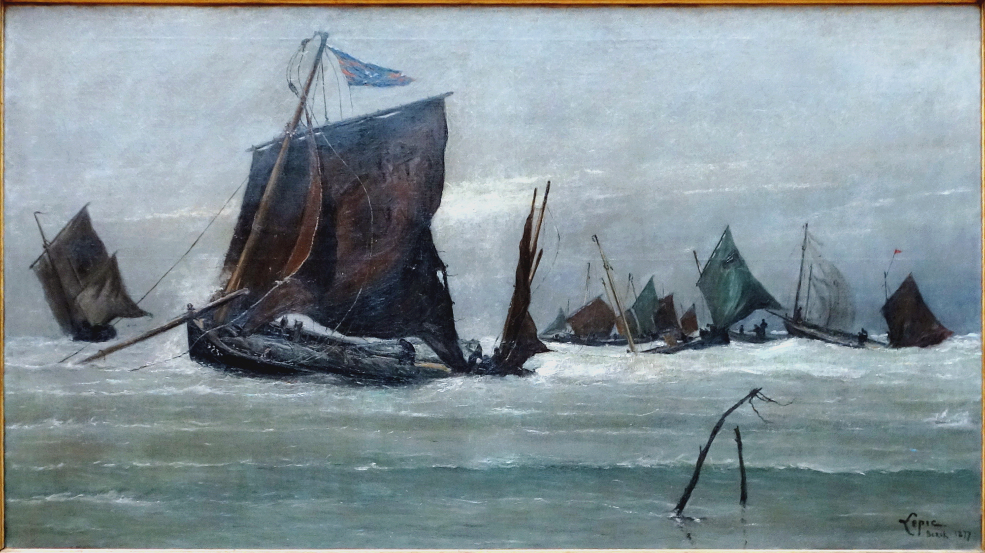 Bateaux de pêche rentrant à Berck (Pas-de-Calais) au Palais des beaux-arts de Lille.